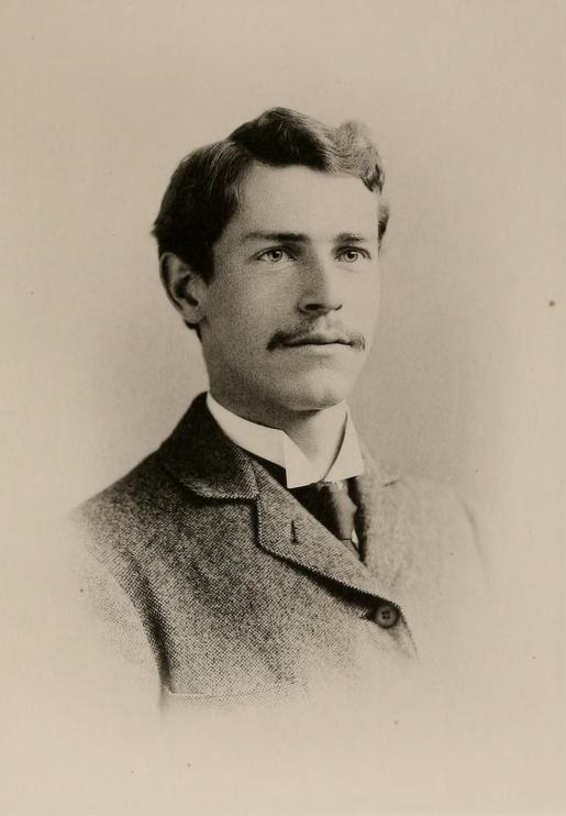 Story Conant, dalla monografia in suo onore (1900)